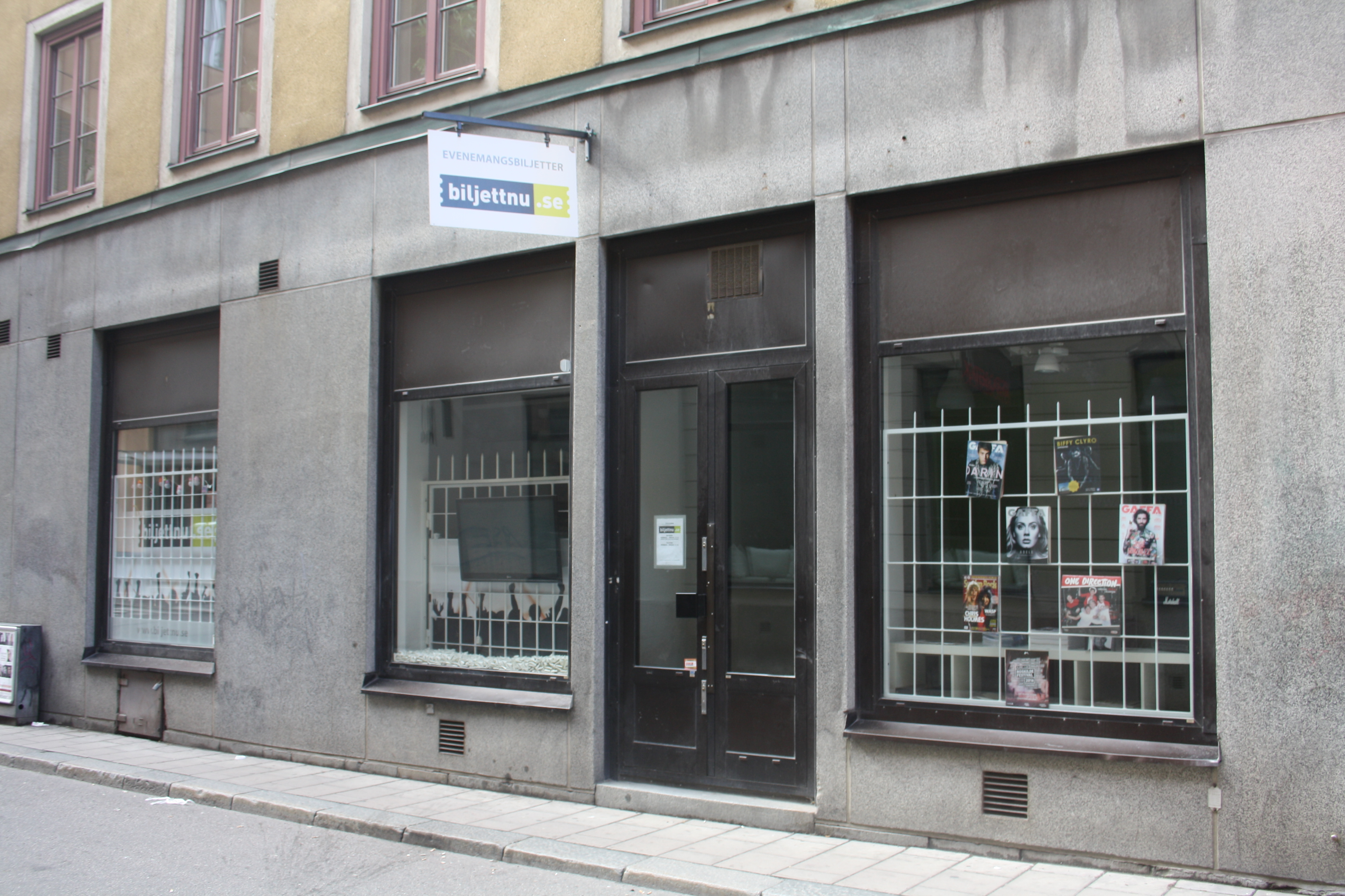 Biljett nu i Stockholm